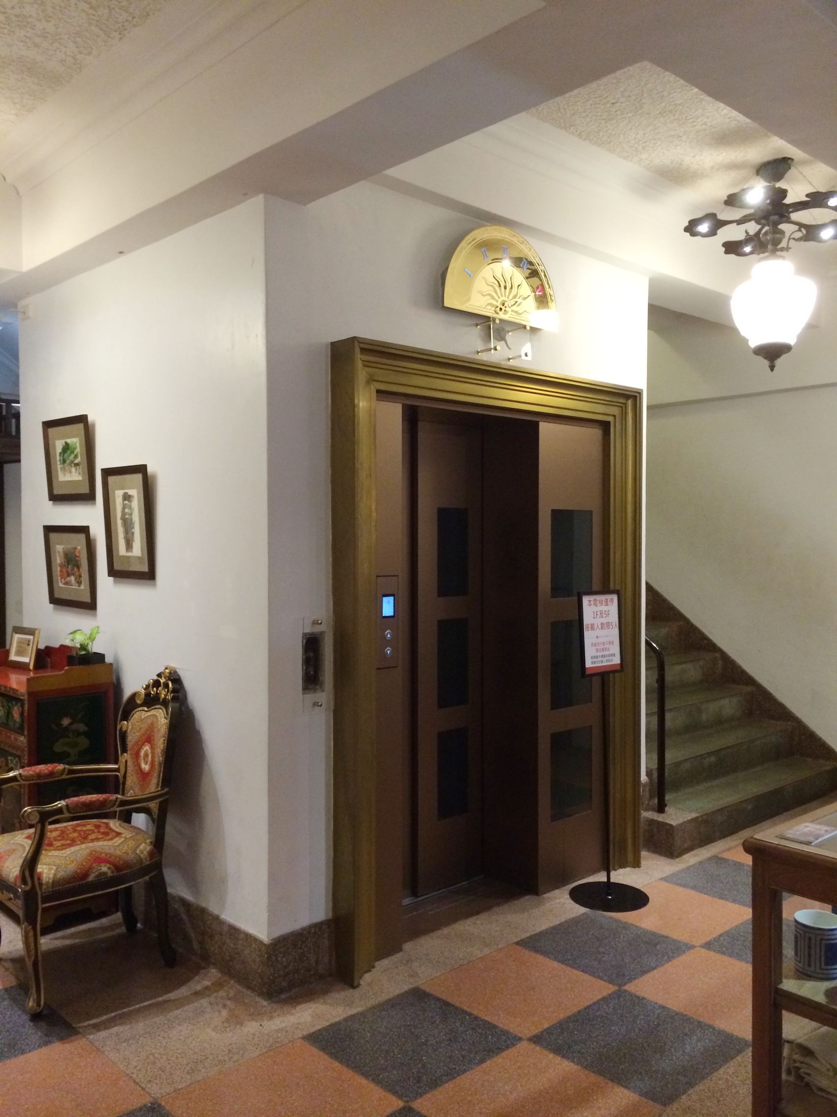 Hayasi Department Store Lift